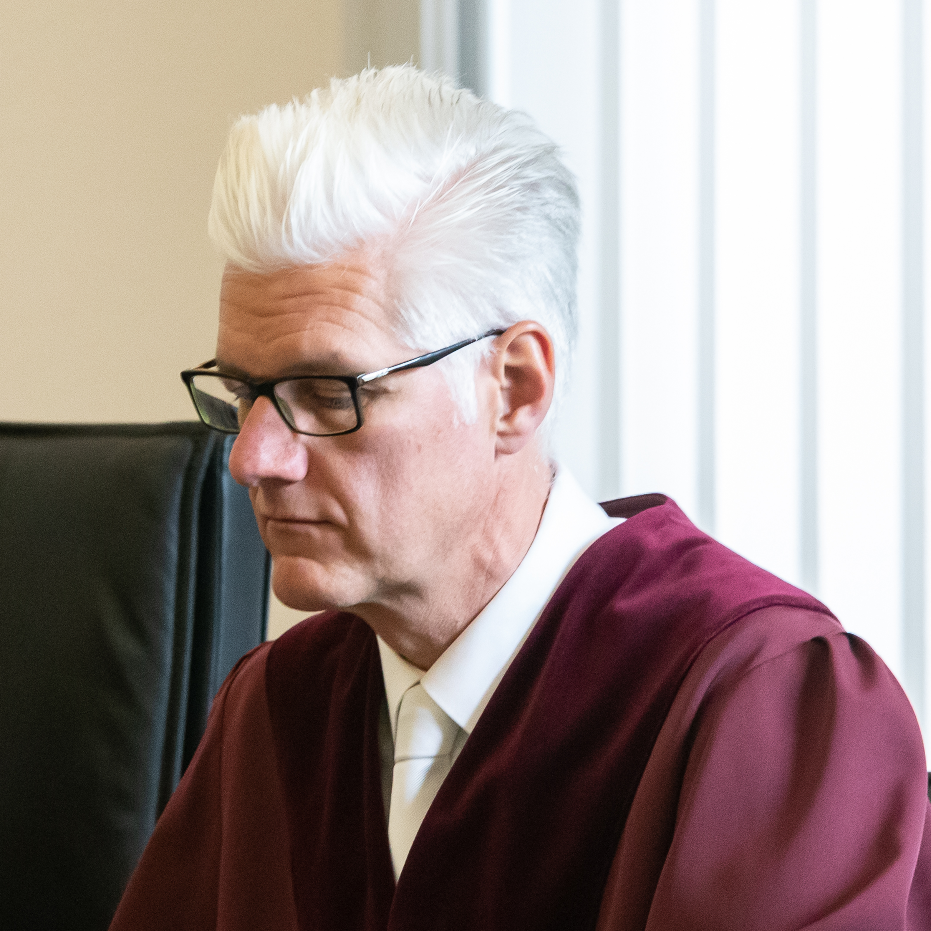 BGH Verhandlungstermin am 31. Oktober 2018 in Sachen I ZR 104/17 (Bundesgerichtshof zur Veröffentlichung von Abbildungen gemeinfreier Kunstwerke): Dr. Christian Löffler, Richter am Bundesgerichtshof; Porträt, Einzelbild